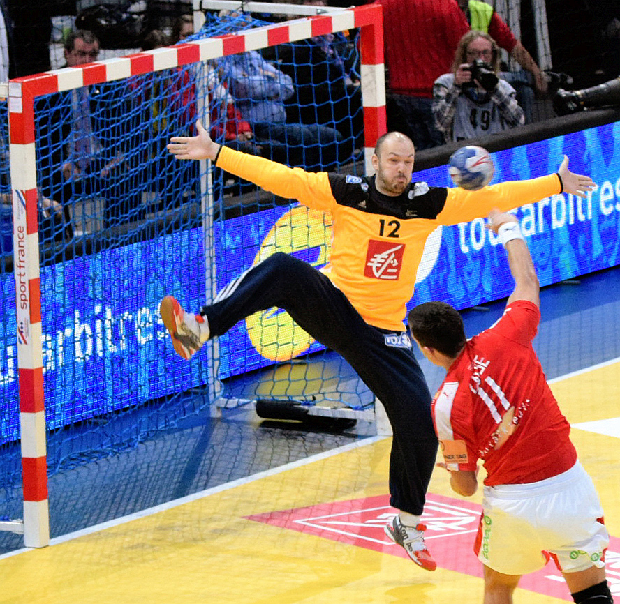 Le 10 janvier 2016 lors du match France / Danemark durant la Golden League à l'AccorHotels Arena (Paris).